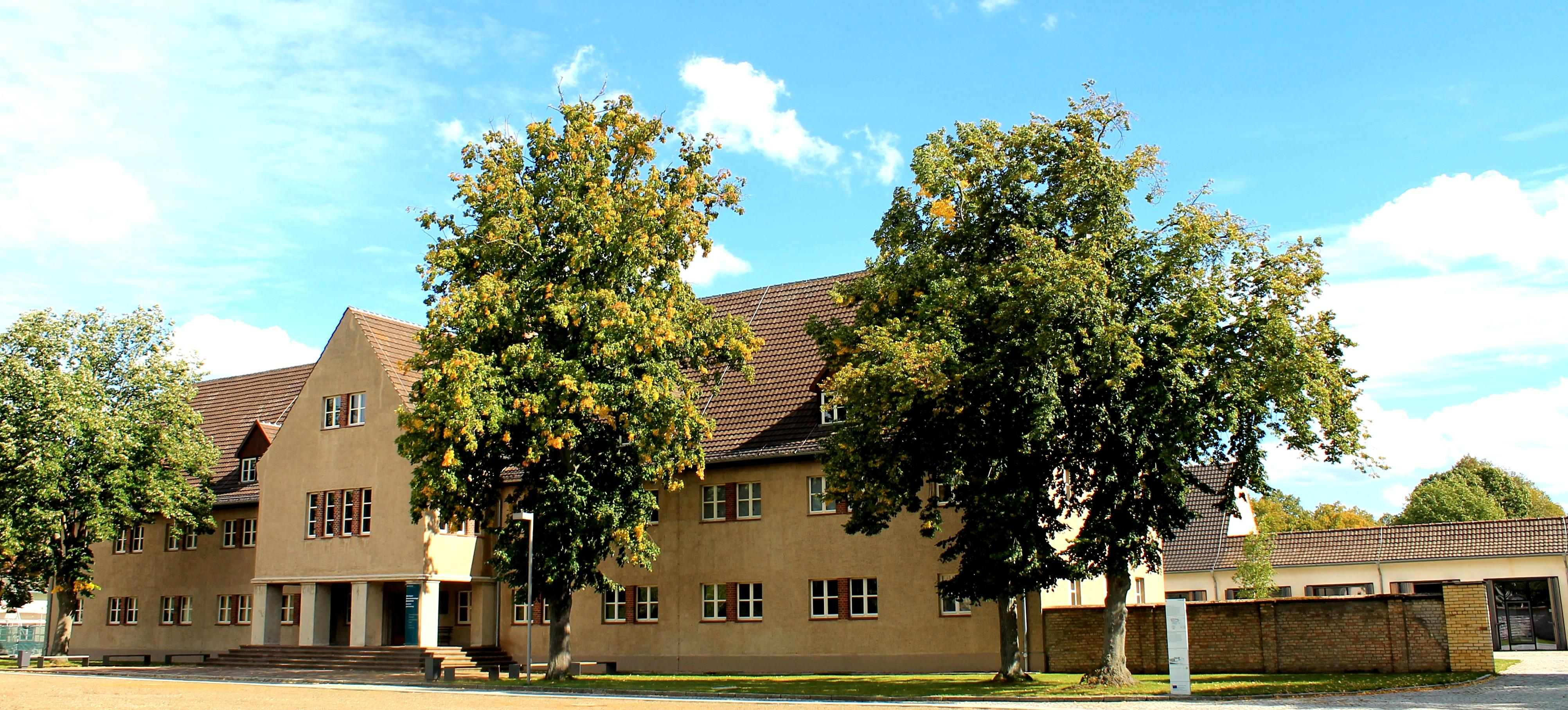 Kommandantur vom KZ Raavensbrück (Heute Ausstellung)